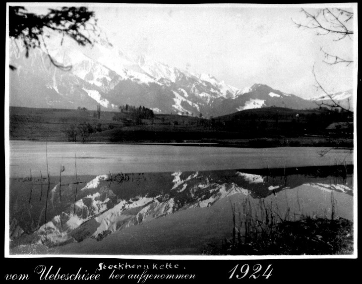 Stockhornkette vom Uebeschisee